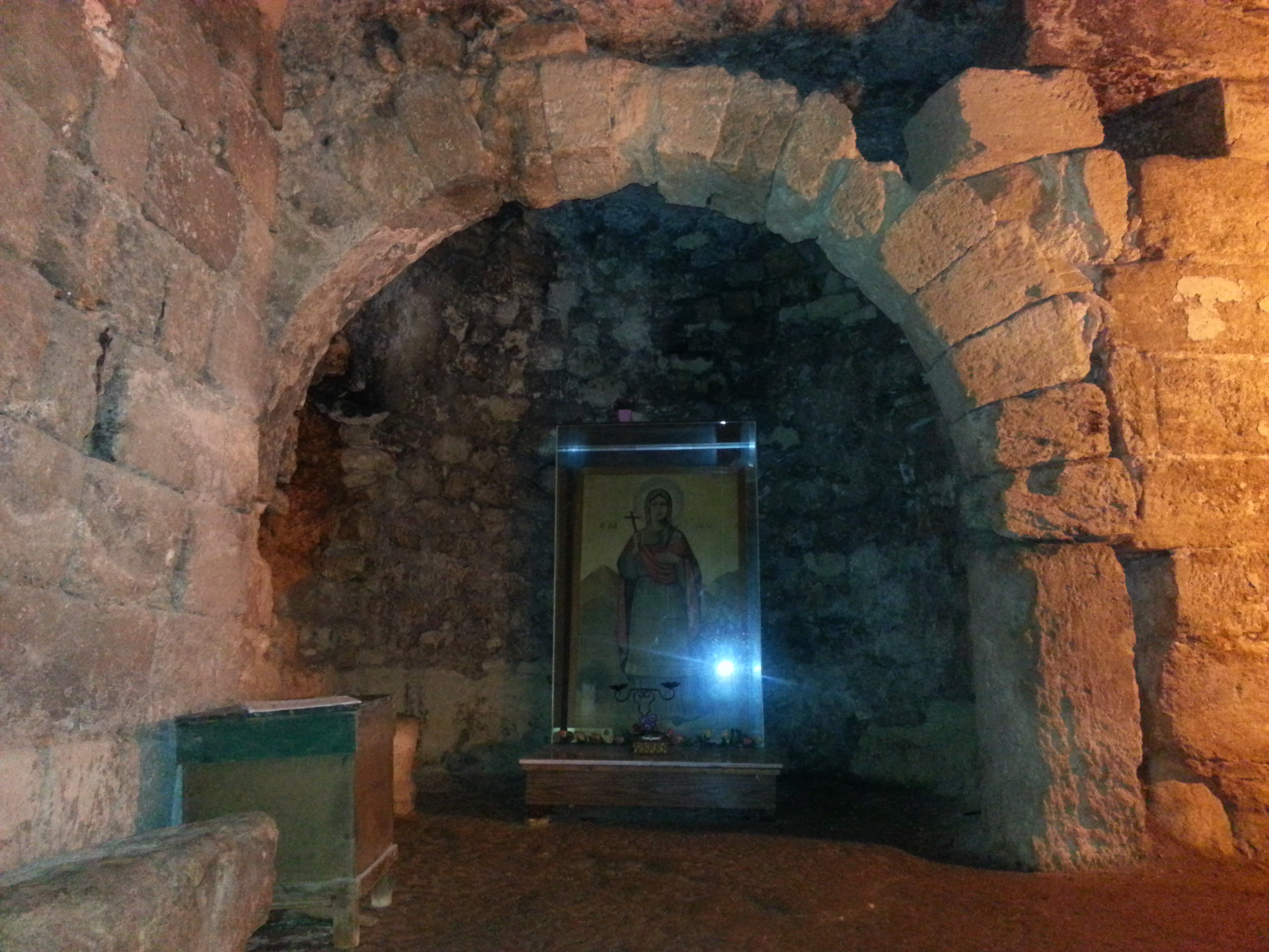 Aya Tekla Bazilikası'nın altındaki sığınaktan bir görünüm.